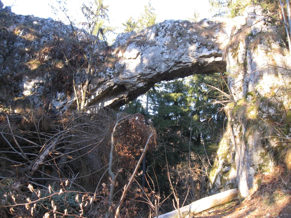 Čertův most v Moravském krasu